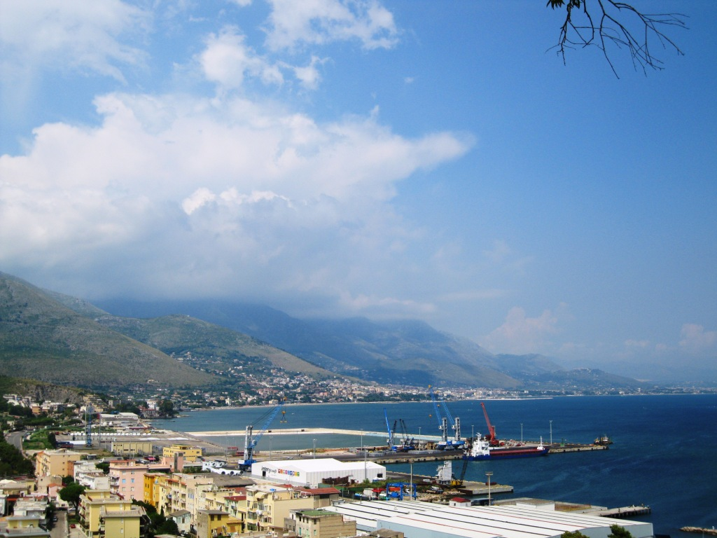 Vista del Porto di Gaeta da Nord